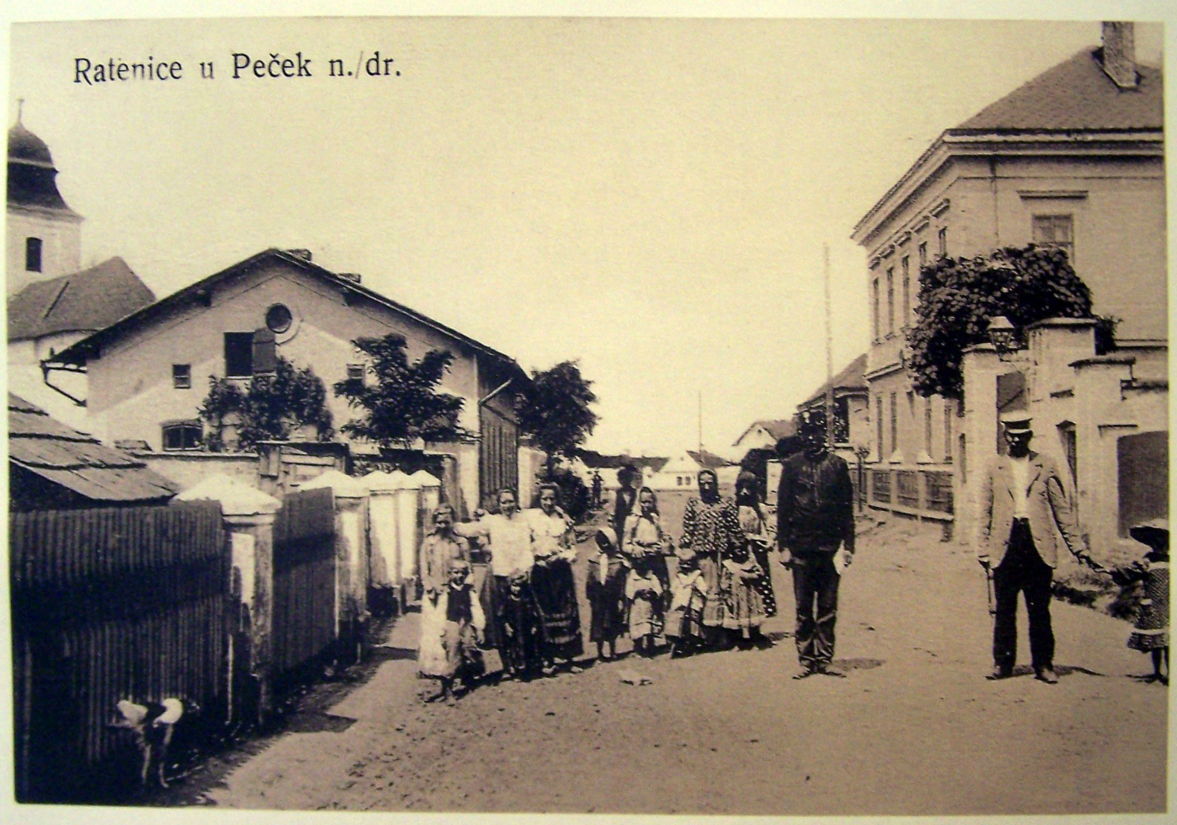 Ratenická stará (vlevo) a nová fara na pohlednici z roku 1916.